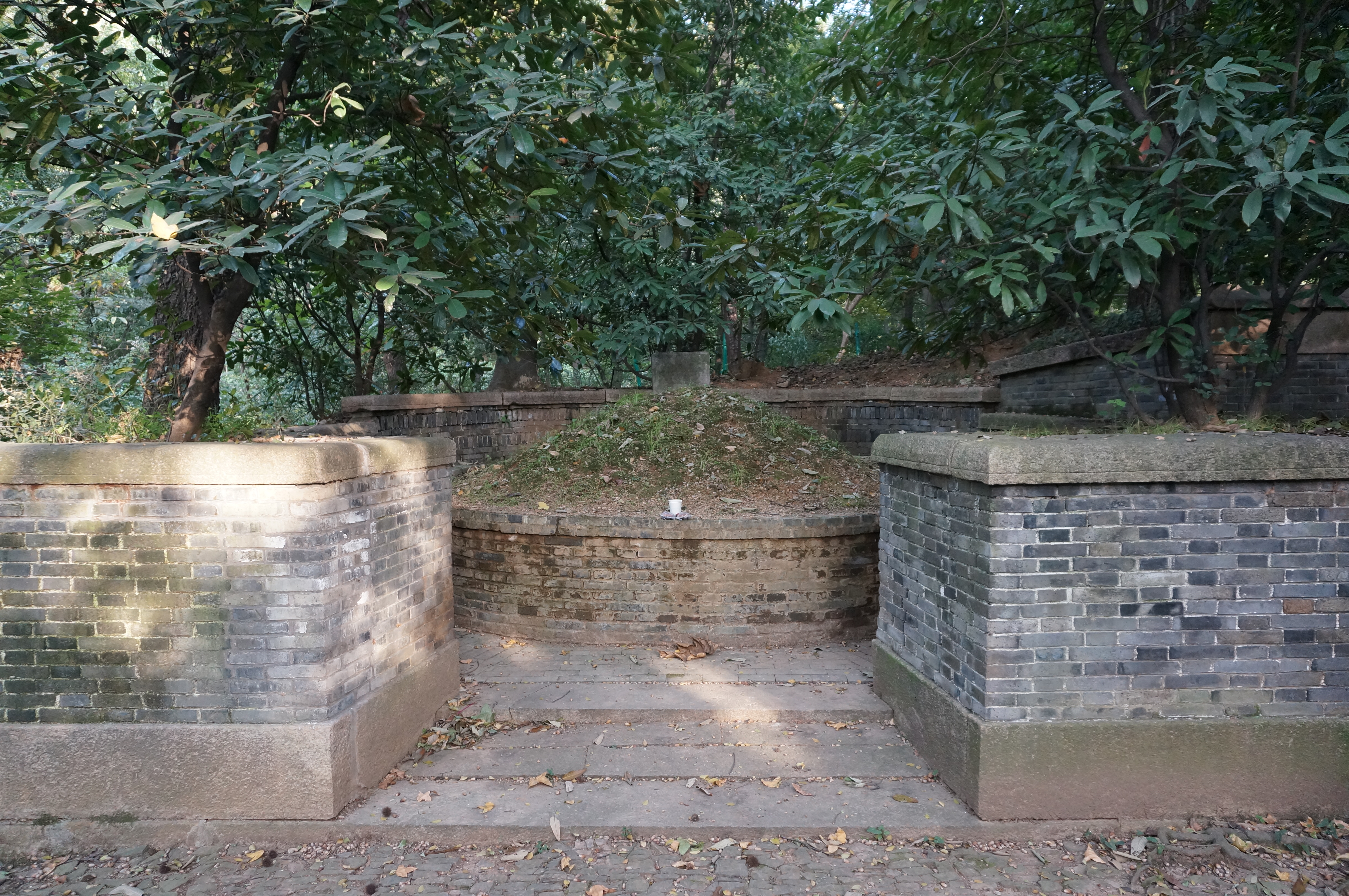 翁同龢墓，罗城及墓堆。